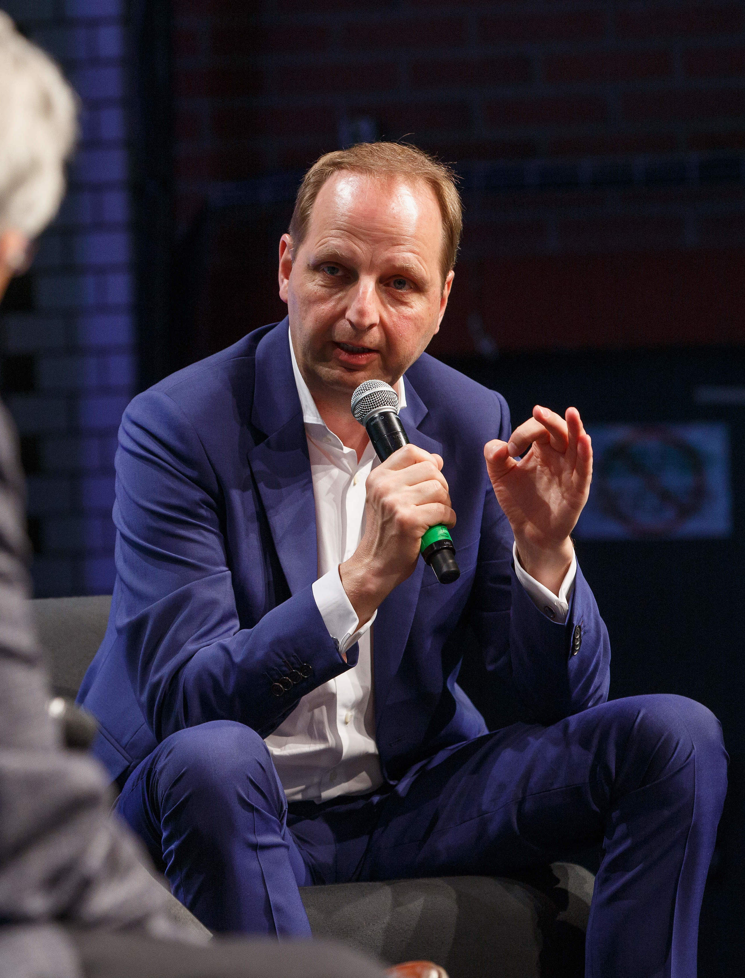 04.05.2018, Berlin: Discussion: re:claim autonomy – Digitale Freiheitsrechte in der neuen Legislatur Speaker: Katarina Barley, Gerhart Baum, Constanze Kurz, Thomas Heilmann, Jakob Augstein Die re:publica ist eine der weltweit wichtigsten Konferenzen zu den Themen der digitalen Gesellschaft und findet in diesem Jahr vom 02. bis 04. Mai in der STATION-Berlin statt. Foto: Jan Zappner/re:publica